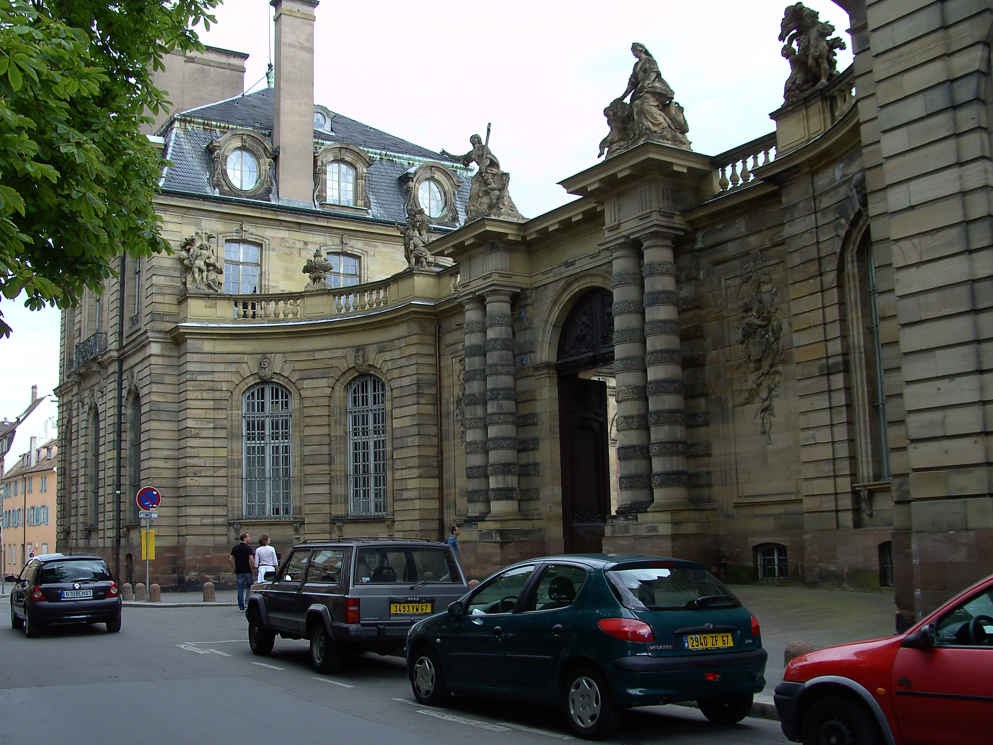 Strasbourg, le Palais Rohan